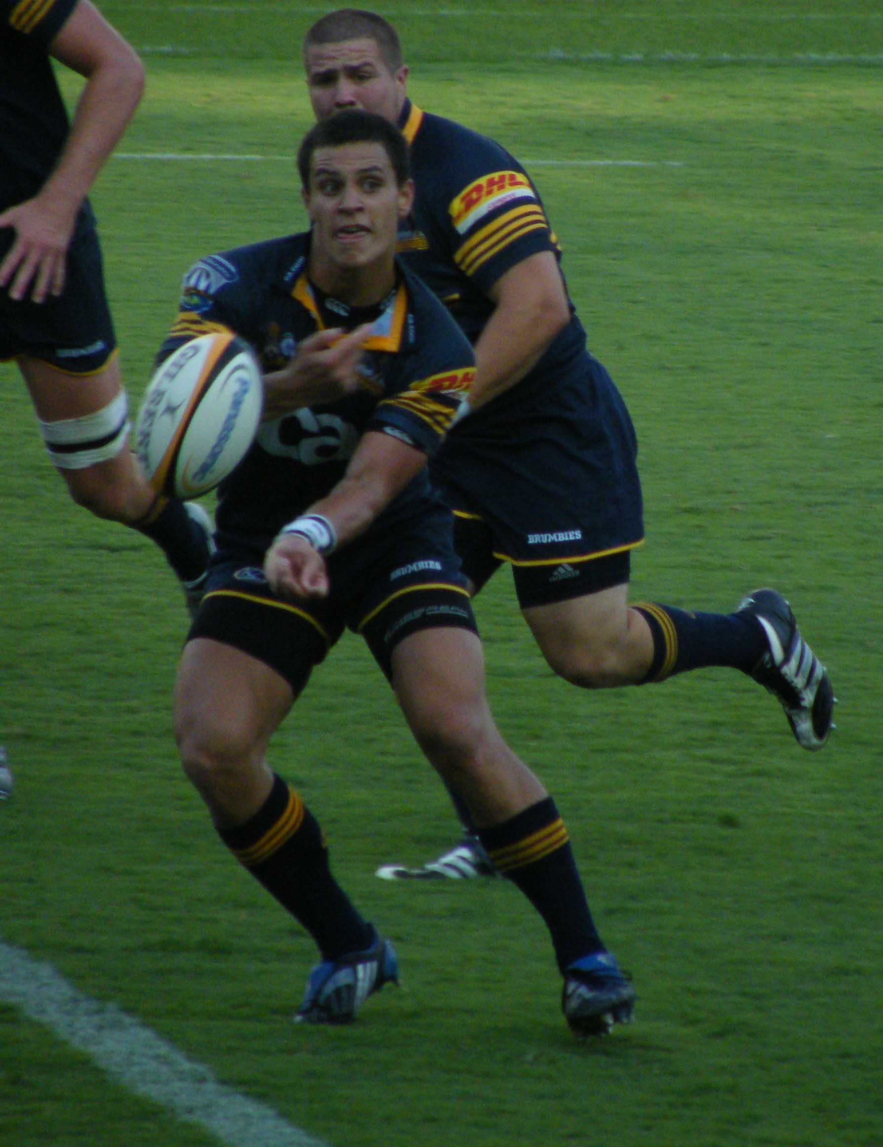 Brumby runner Matt Toomua